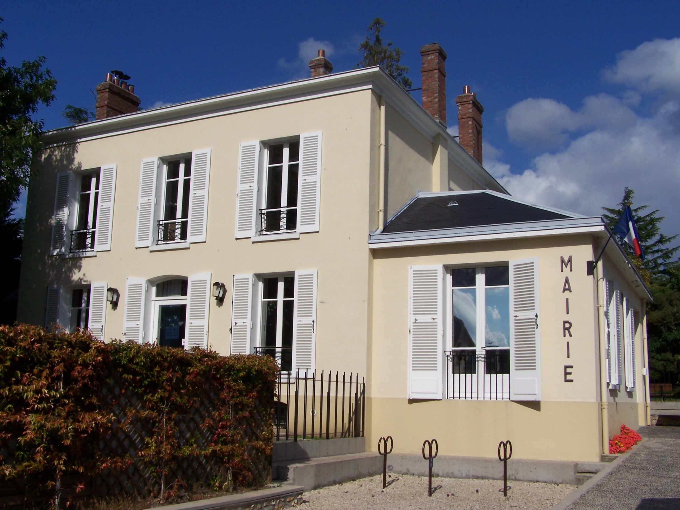 Mairie de Bonnelles (Yvelines, France)